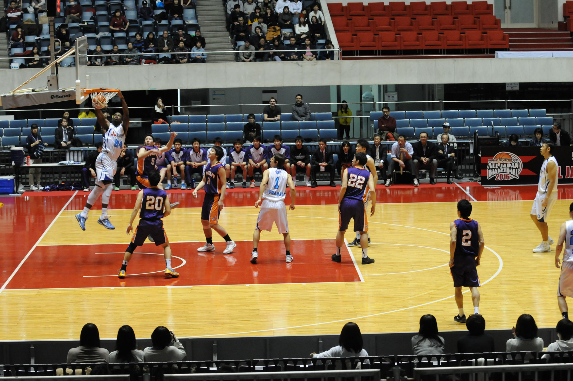 2016年全日本総合バスケットボール選手権大会二回戦、三菱電機ダイヤモンドドルフィンズ名古屋対明治大学。代々木第一体育館で。